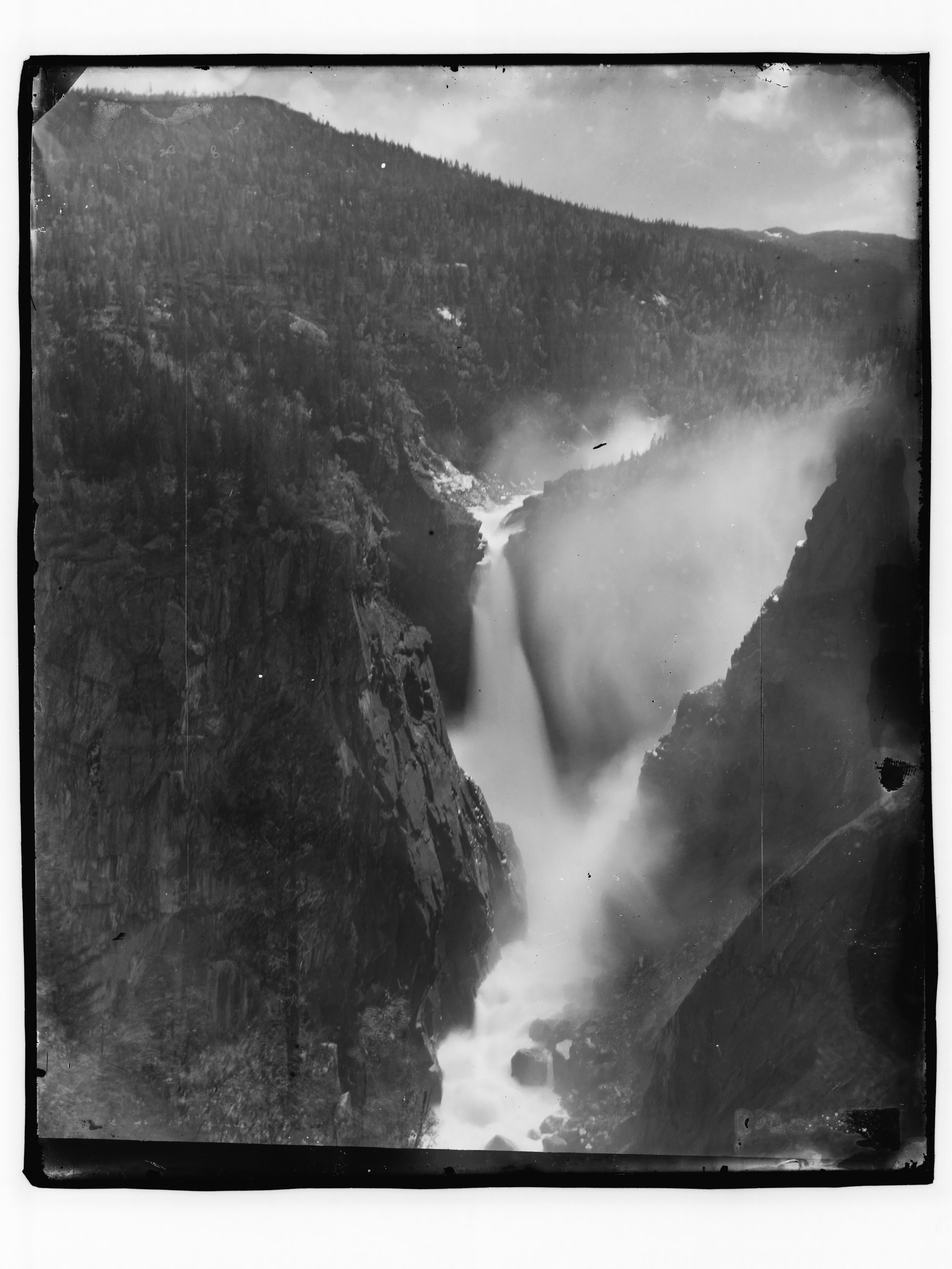 Påskrift konvolutt: Foss med langt fall M.Skøien [Riksantikvaren] Sted: Rjukanfossen Kommune: Tinn Fylke: Telemark Tagger: landskap foss dalføre